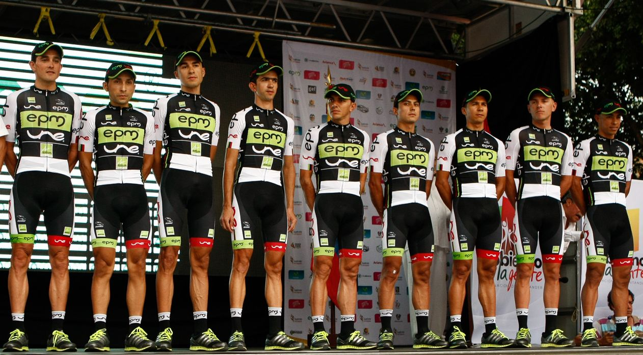 Presentación en la Vuelta a Colombia 2014